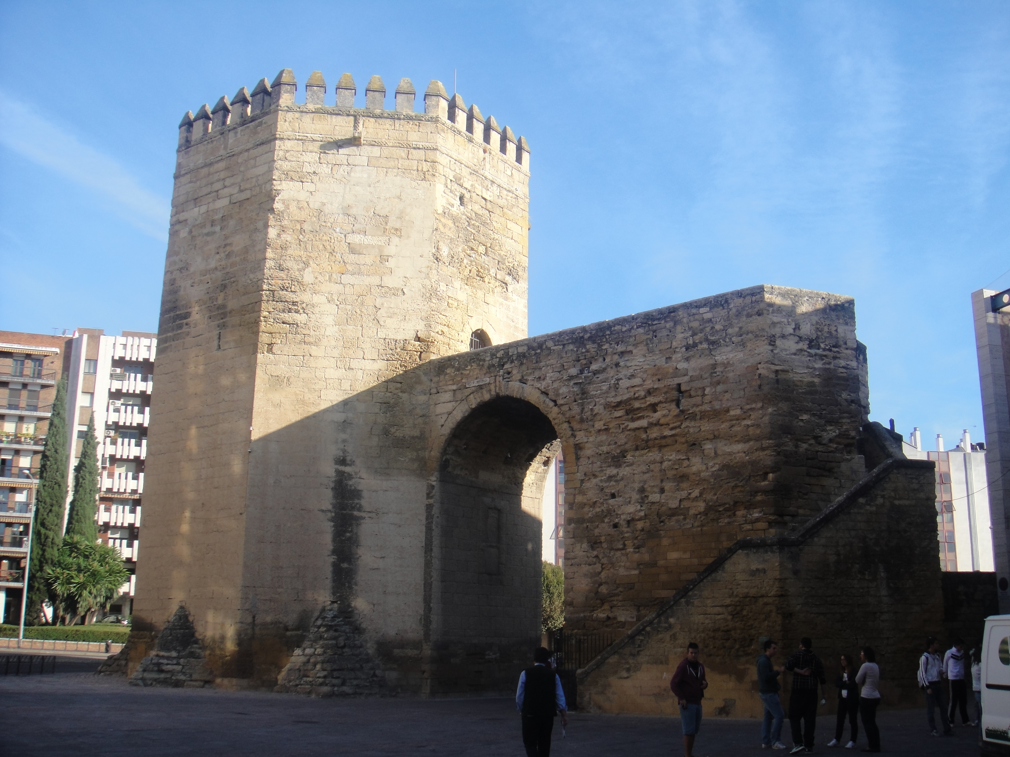 Torre de la Malmuerta, Córdoba (España).